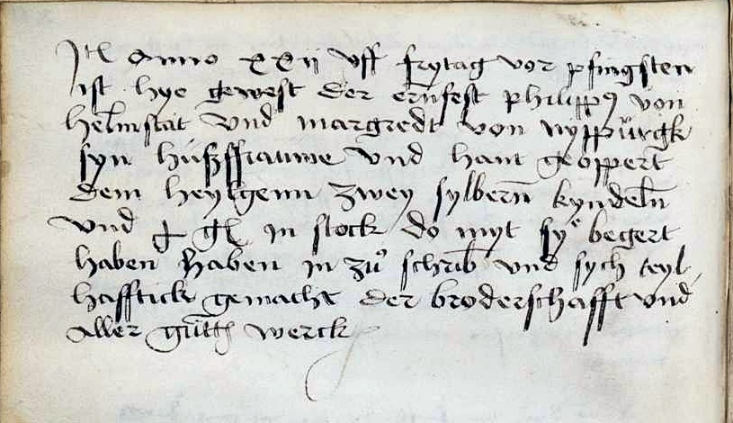 Zeller Bruderschaftsbuch, Eintrag über den Besuch des Philipp von Helmstatt (Hofmeister der Pfälzer Kurfürsten) und seiner Gattin Margarethe von Neipperg , 1522. Sie stiften 2 silberne Kindlein.